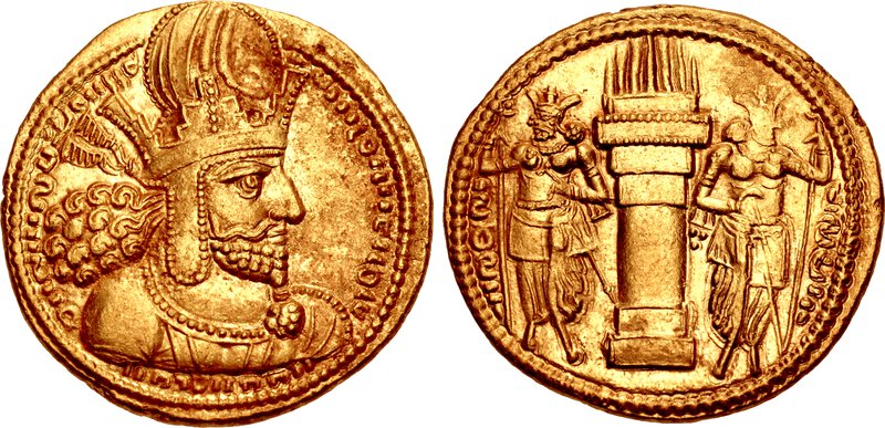 Dinar de Sapor I cunhado em Ctesifonte ca. 260-272SASANIAN KINGS. Šābuhr (Shahpur) I. AD 240-272. AV Dinar (22mm, 7.38 g, 3h). Mint I (“Ctesiphon”). Phase 2, circa AD 260-272. mzdysn bgy šhpwhry MRK’n MRK’ ’yr’n MNW ctry MN yzd’n in Pahlavi, bust right, wearing diadem and mural crown with korymbos / nwr’zy in Pahlavi to right, šhpwhry in Pahlavi to left,, fire altar; flanked by two attendants wearing mural crowns; pellets to right of altar shaft. SNS type IIc/1b, style P, group b; Göbl type I/1; Saeedi AV4 var. (no pellets on rev.); Sunrise 739 var. (same). EF, slight die rust on obverse, minor double strike on reverse.